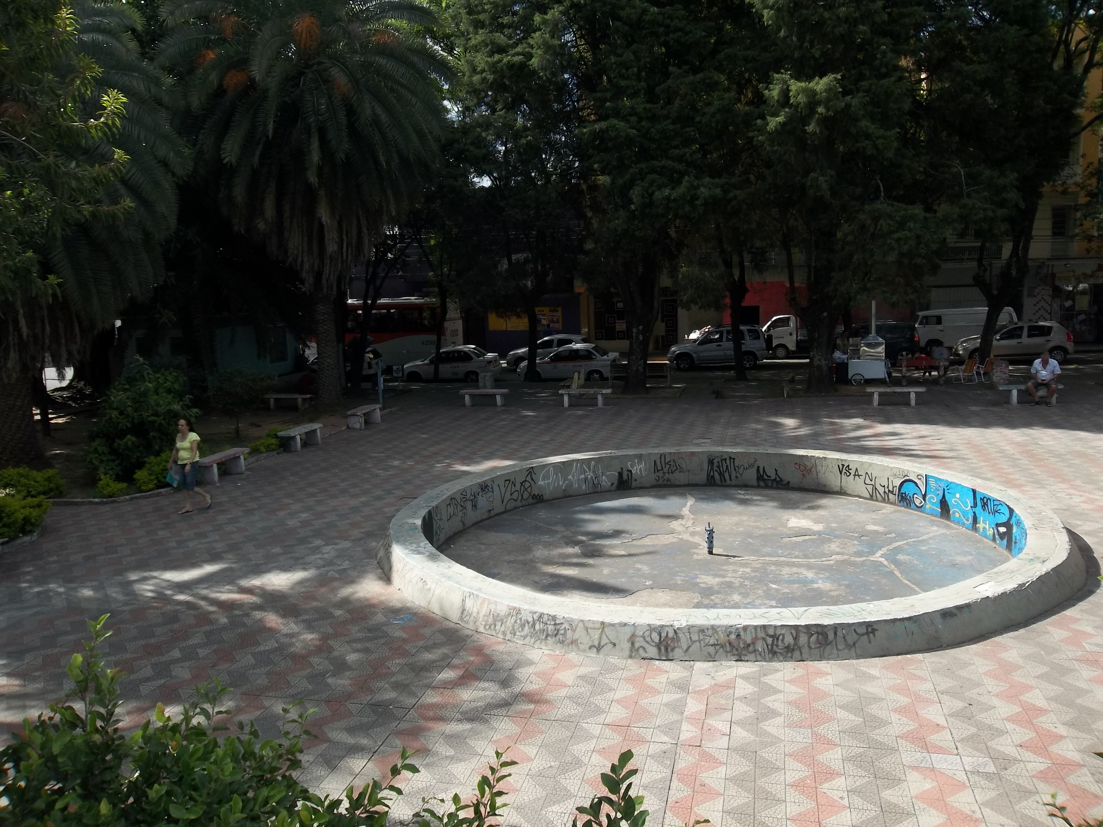 Praça Saturnino de Brito, Centro, Sede, Santa Maria, Rio Grande do Sul, Brasil